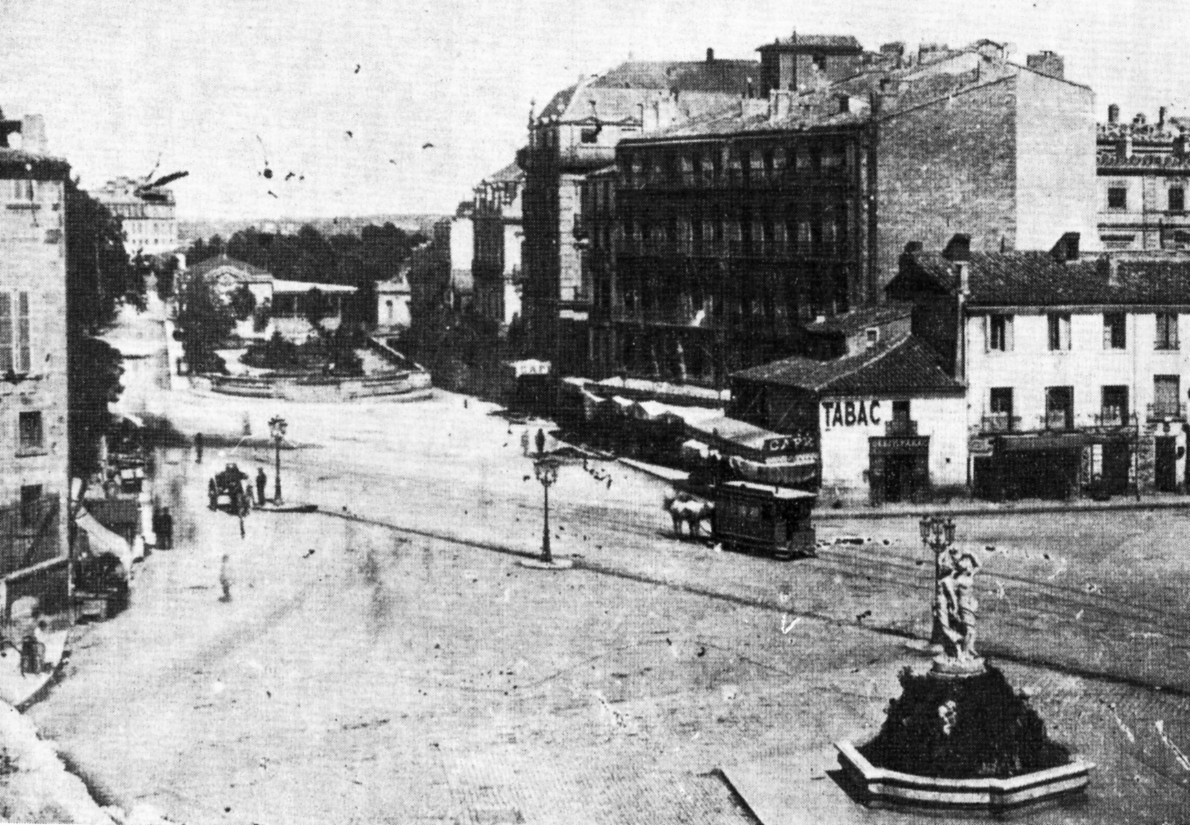 Transports en commun de Montpellier - Place de la Comédie - Tramway à chevaux.